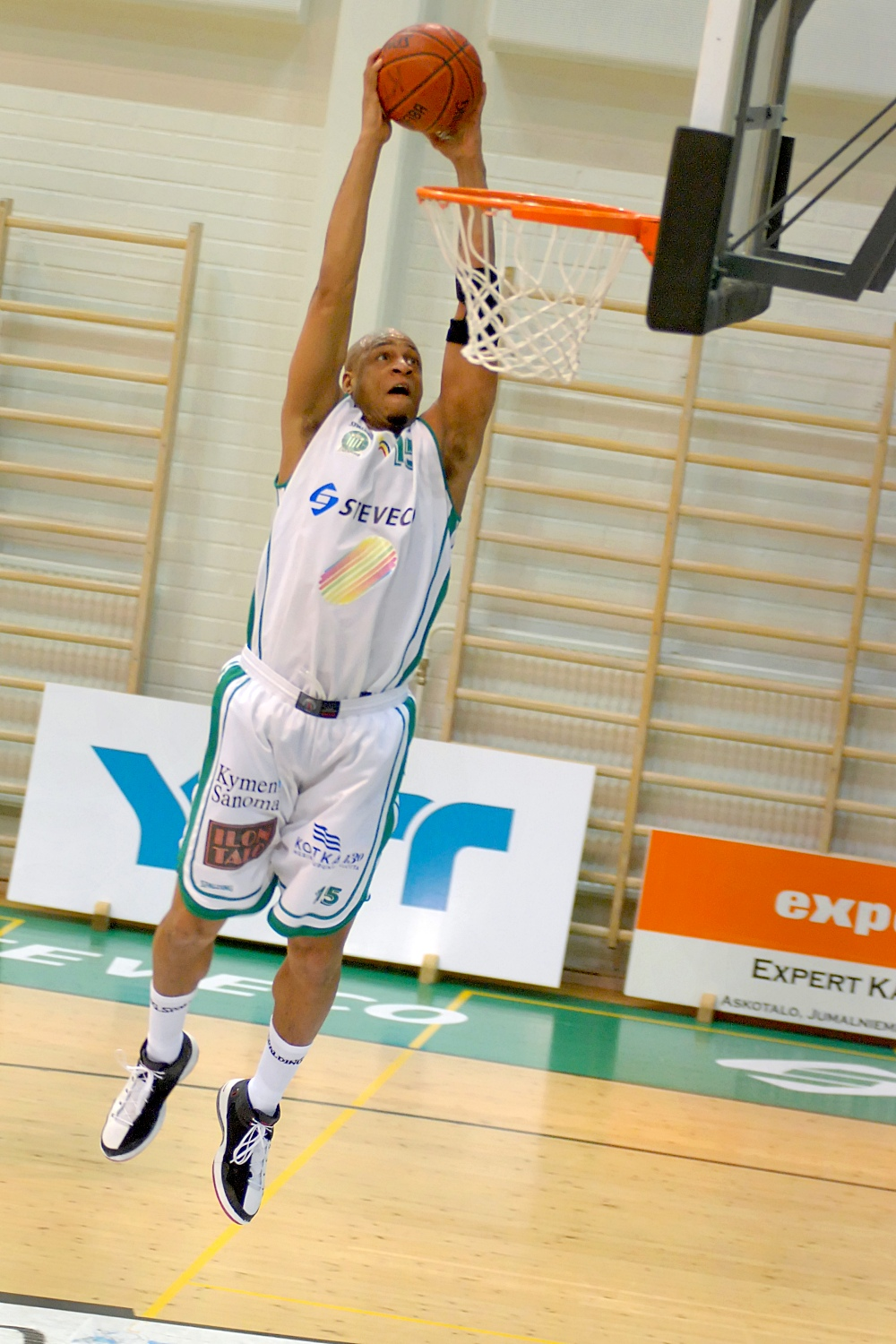 Koripalloilija Isaac Spencer Kotkassa ottelussa Lappeenrannan NMKY:ta vastaan 10.2.2010.